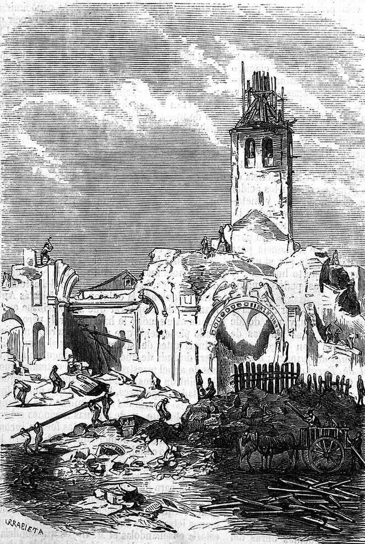 «Derribo de los templos», en la revista española El Museo Universal.